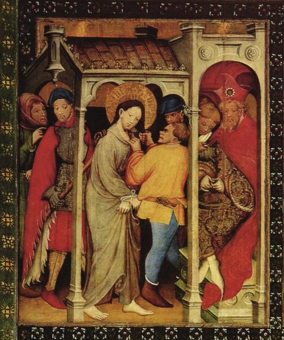 Détail du retable de Bad Wildungen